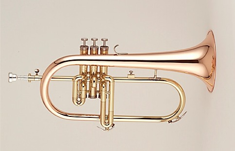 zelf gemaakt